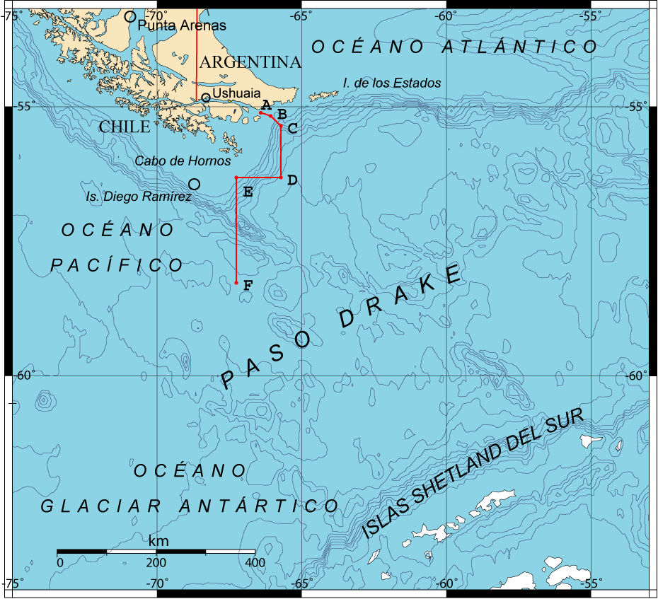 Mapa del Paso Drake que muestra los puntos A, B, C, D, E y F del límite acordado en el Tratado de Paz y Amistad entre la Argentina y Chile de 1984.